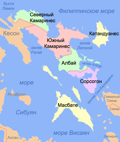 Карта провинций Бикольского региона Филиппин